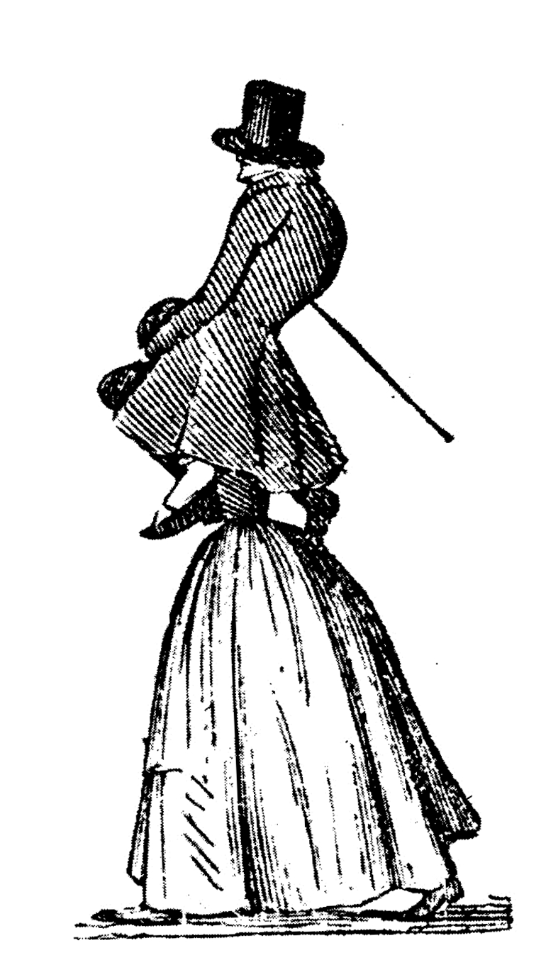 Karikatur mit dem Unbtertitel (übersetzt) S. K., sein Mädchen trainierend